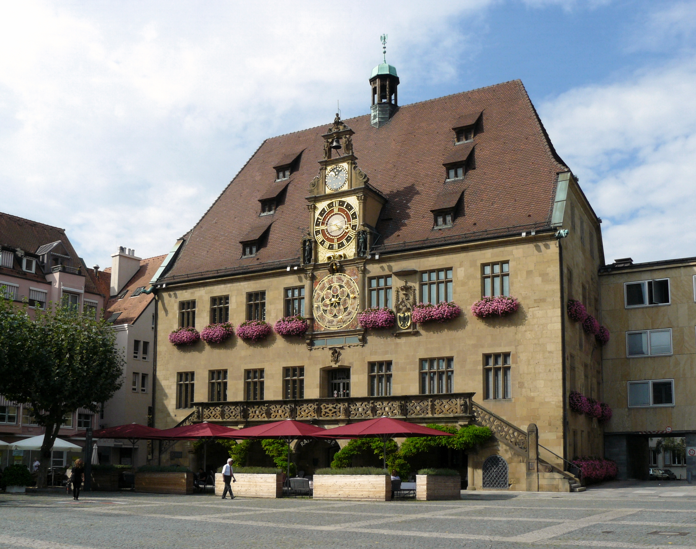 Ansicht des Heilbronner Rathauses mit astronomischer Kunstuhr und Wappenengel